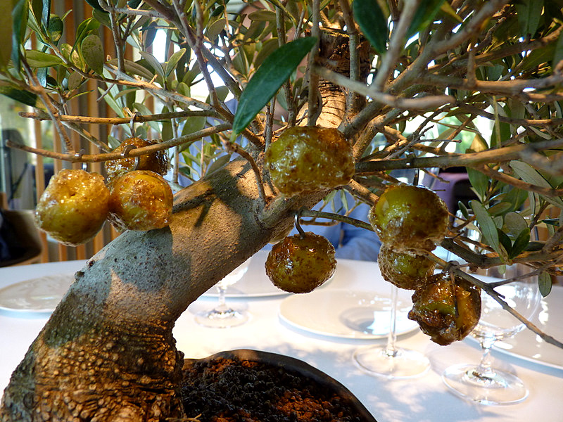 Olives caramelitzades